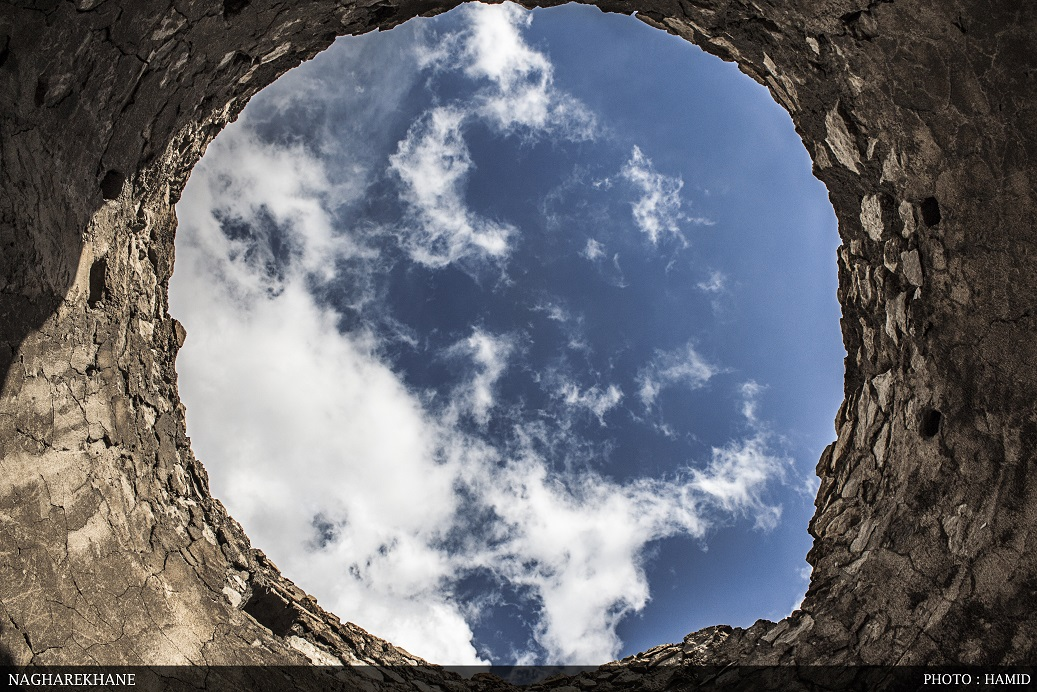 نقاره خانه